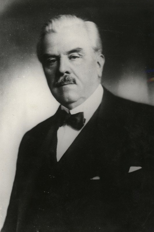 Gróf zicsi és vázsonykői Zichy János Baptista Mária Szilveszter Ferdinánd Henrik György Kamilló Aladár (Nagyláng, 1868. május 30. – Nagyláng, 1944. január 6.) jogász, császári és királyi kamarás, valódi belső titkos tanácsos, nagybirtokos, a Magyar Királyság kultuszminisztere, legitimista politikus, agrárius, az MTA igazgató tagja (1925), az Aranygyapjas rend lovagja.